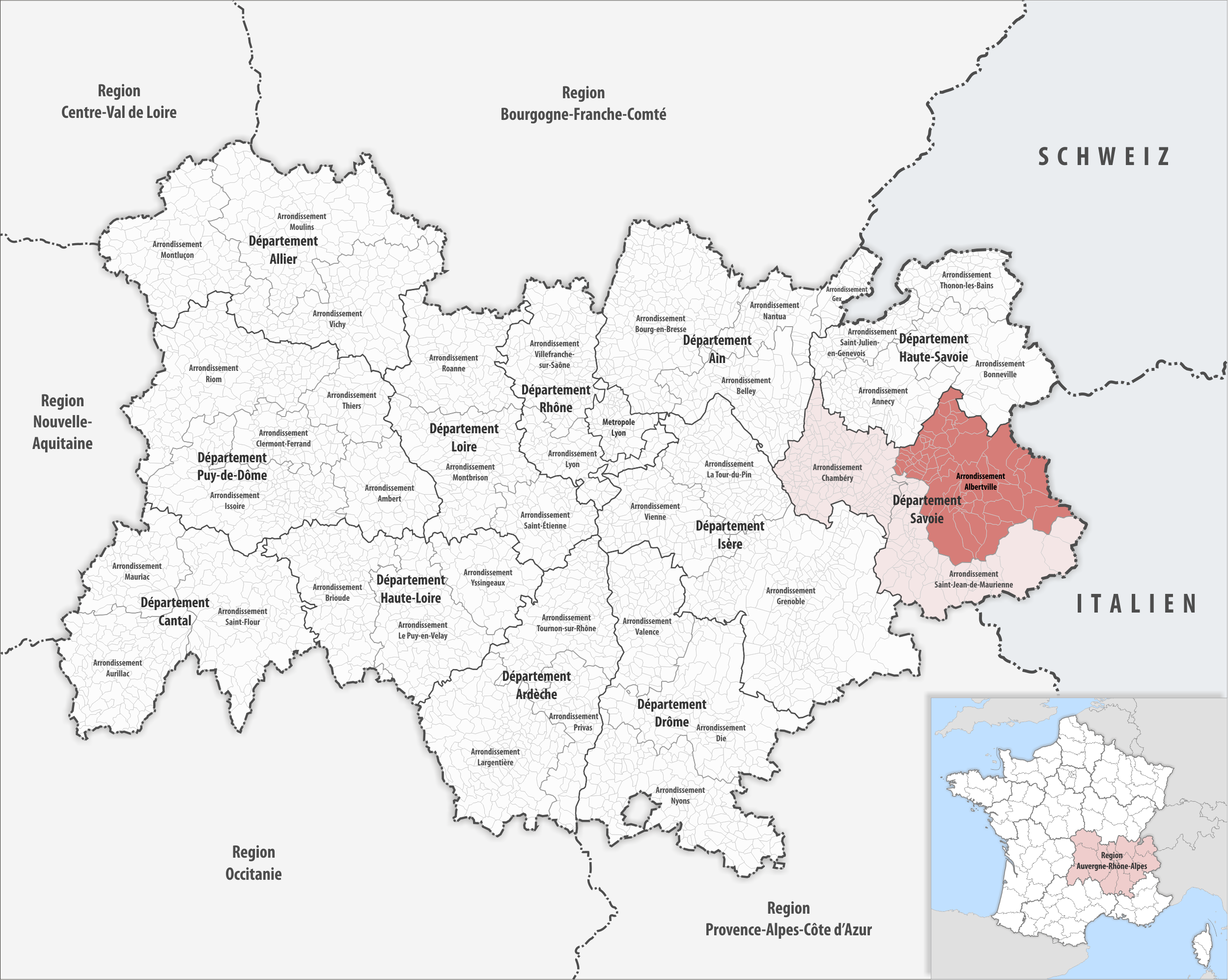 Lage des Arrondissements Albertville